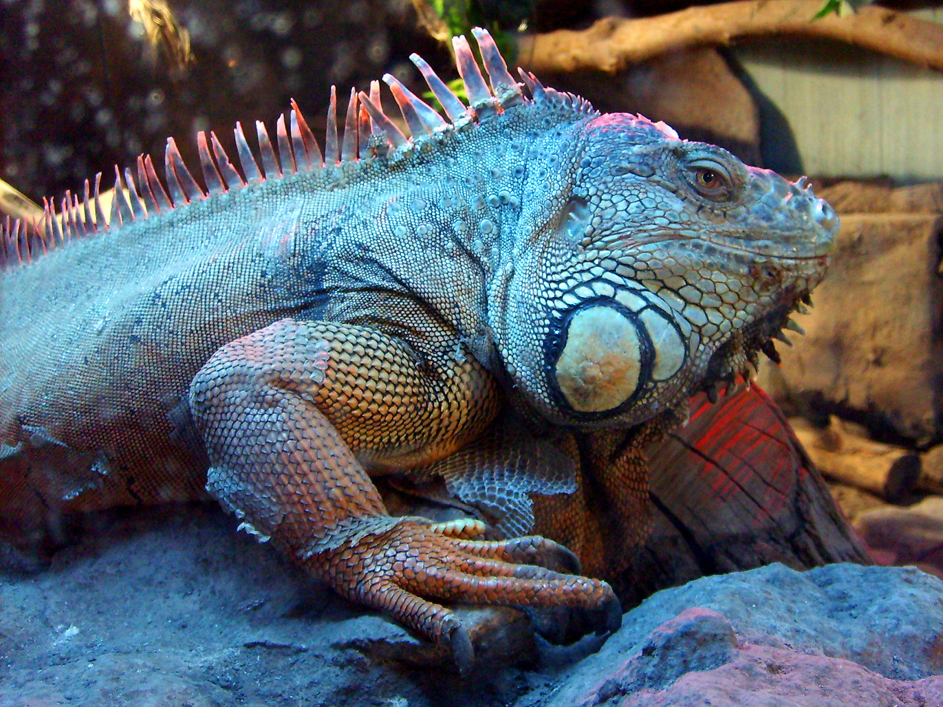 Iguana perteneciente al herpetario del zoológico Buín Zoo, en la comuna de Buín, Santiago de Chile.